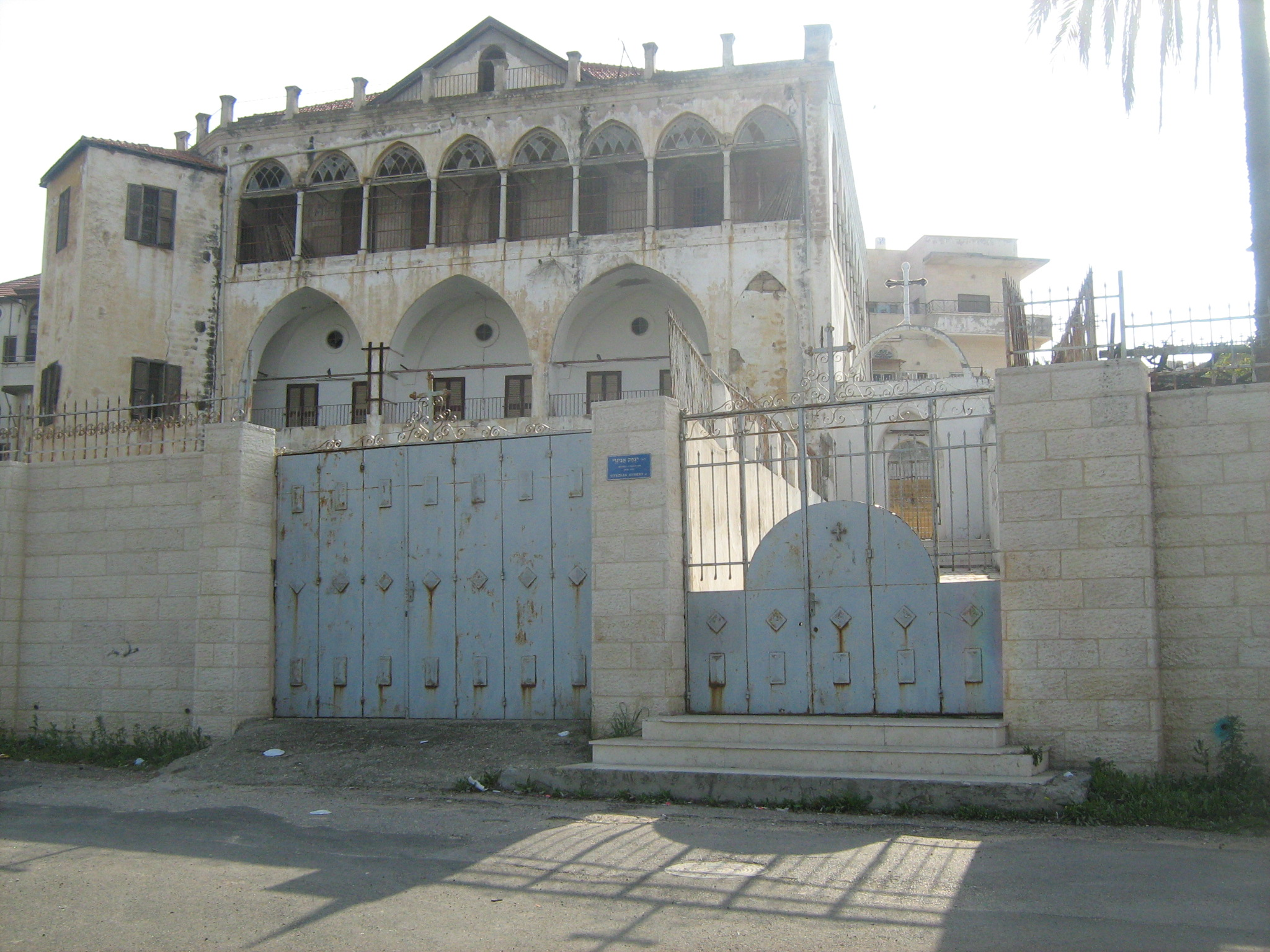 מנזר אנטוניוס הקדוש הארמני ביפו